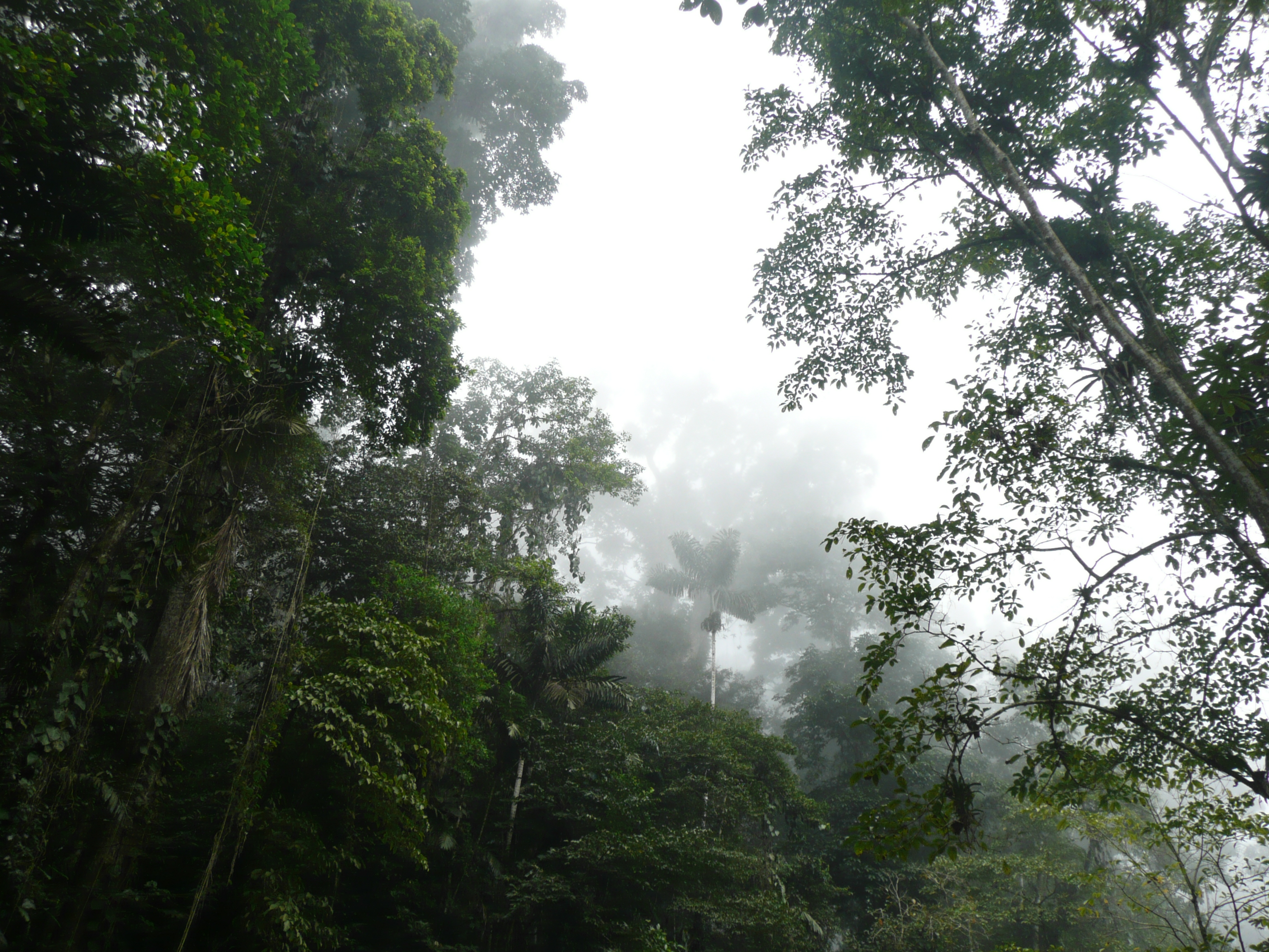 Selva nublada. Parque Nacional Henri Pittier (Venezuelan Coastal Range). Carretera Maracay-Ocumare de la Costa. Estado Aragua, Venezuela.